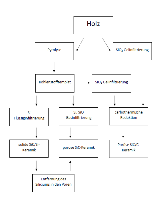 Verschiedene Wege der Herstellung biomorpher Keramiken nach J. Ramiez, J. Martinez-Fernandez und M. Singh